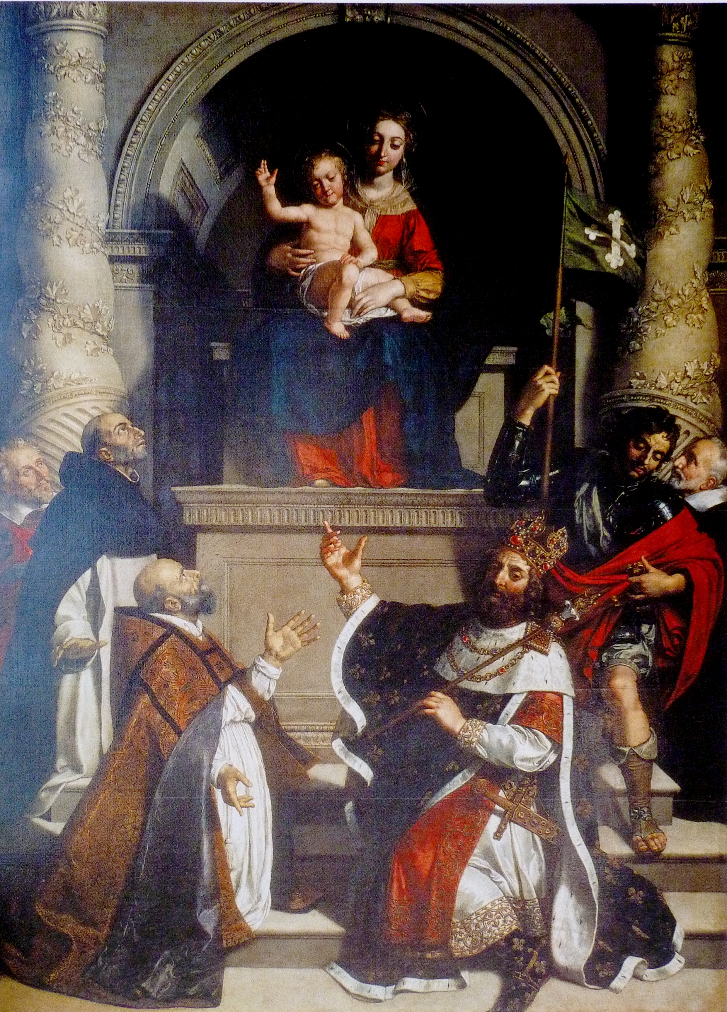 Le roi à droite serait Charlenagne, il porte le sceptre de Charles V, la couronne de Saint-Louis (l'un des deux seuls tableaux à la représenter, avec La messe de saint Gilles), l'épée Joyeuse, la grande agrafe et les éperons d'or du trésor de Saint-Denis. Commentaire plus complet